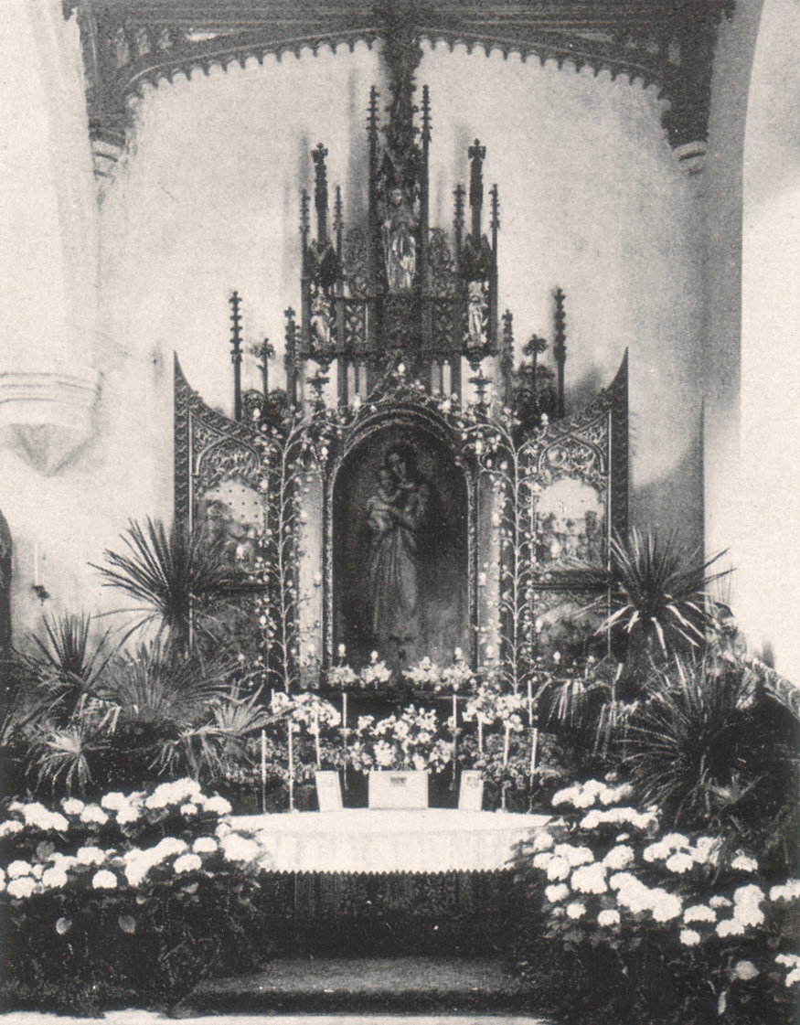 Ravensburg, Pfarrkirche St. Jodok, Seitenaltar von Theodor Schnell d. Ä. (erbaut in den 1860er Jahren). Zerstört bei einer Kirchenrenovierung der 1950er Jahre.